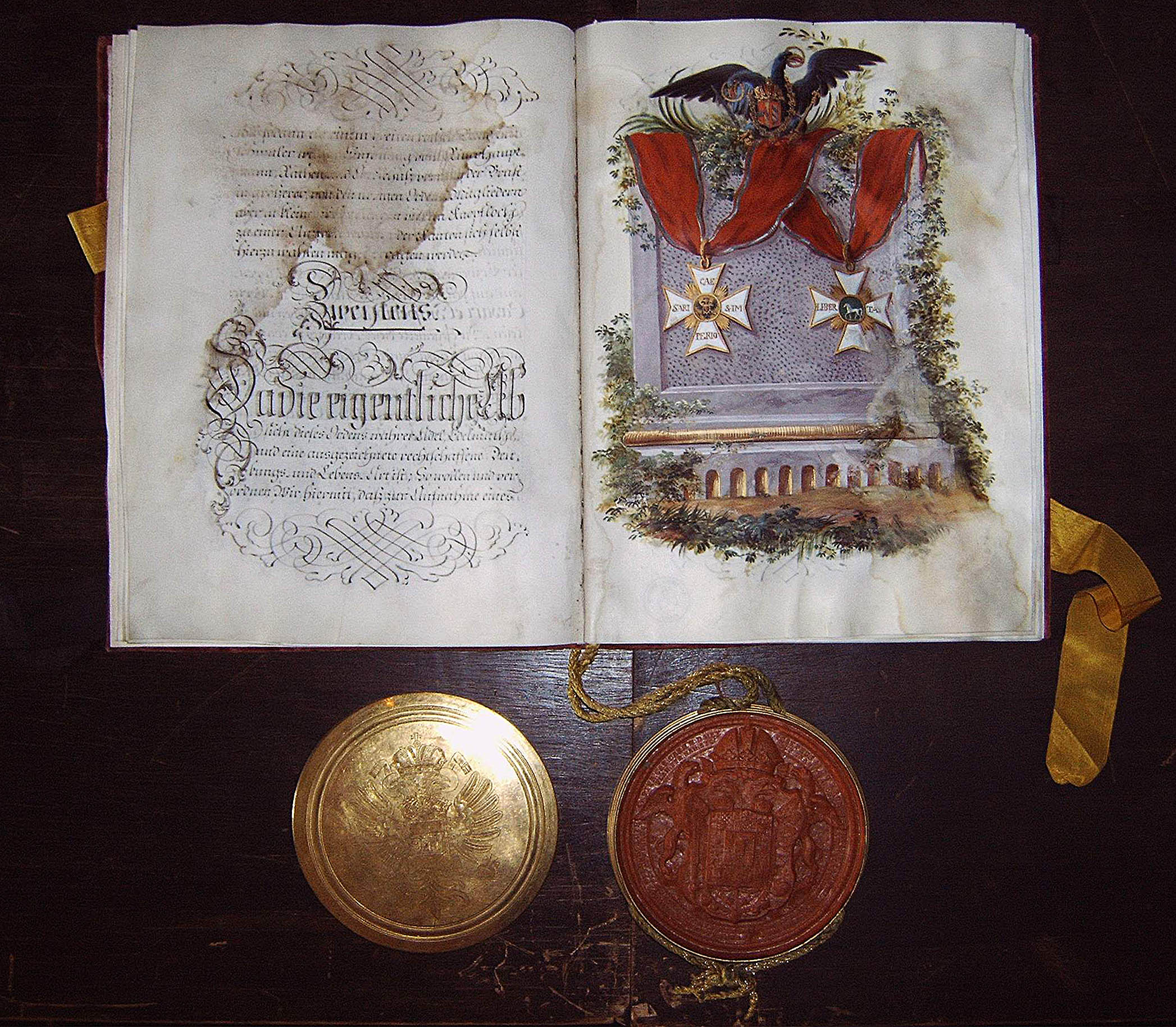 Mit dieser Urkunde berechtigte 1778 Kaiser Joseph II. den Ritterkanton Odenwald zur Verleihung von Orden. Archiv Burg Hornberg.